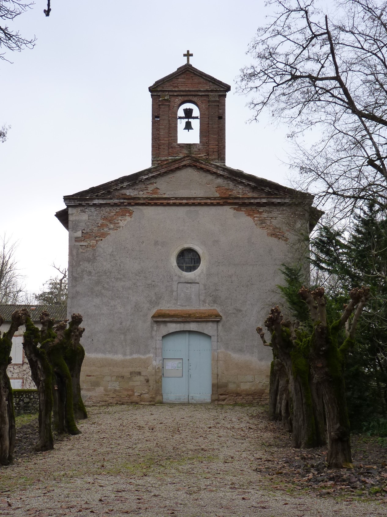 Photo de la chapelle de Cayrac du début XVIIIe avec un clocheton XIXe.